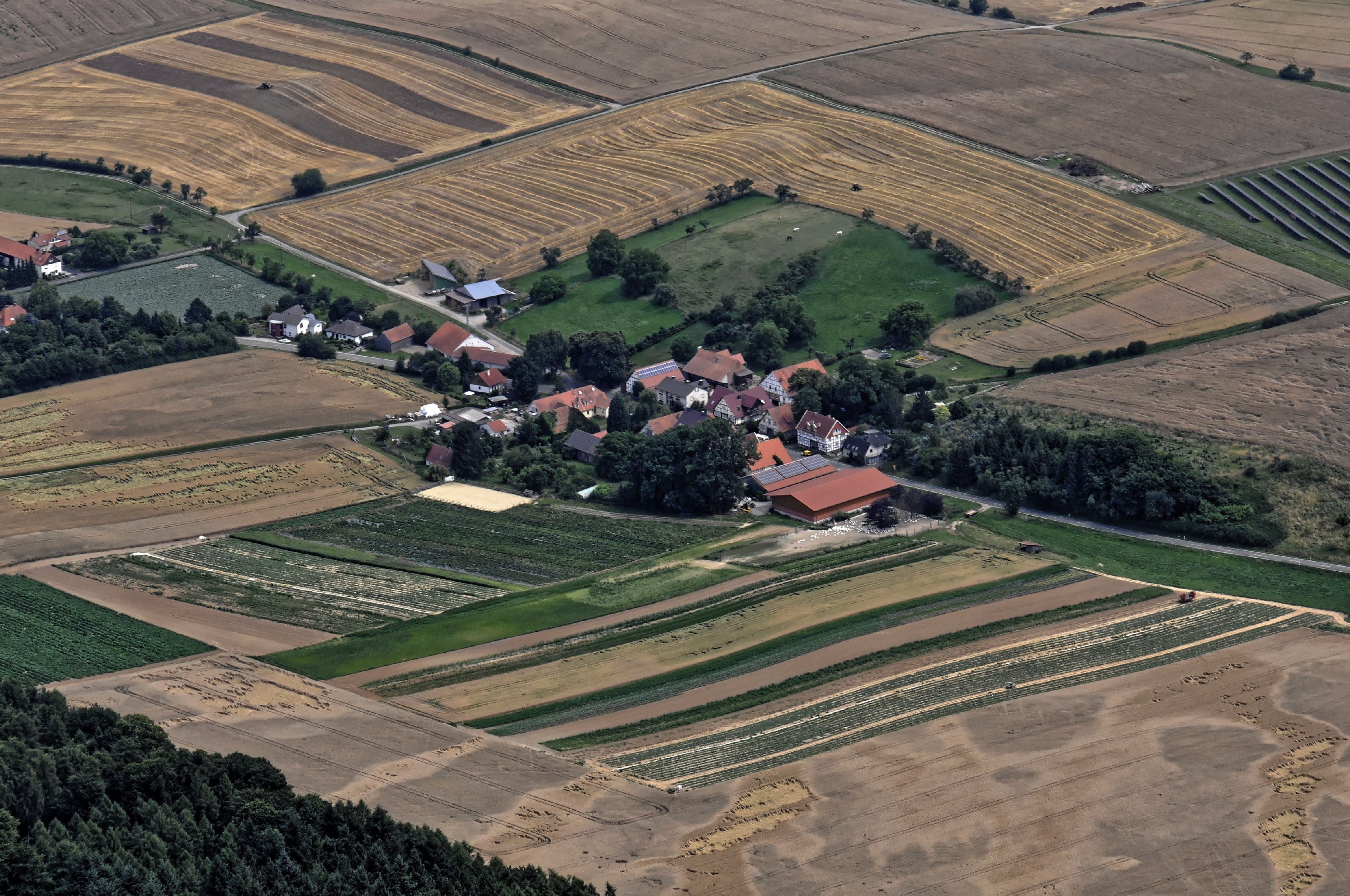 Bilder vom Flug Nordholz-Hammelburg 2015: Grebenstein-Friedrichsthal